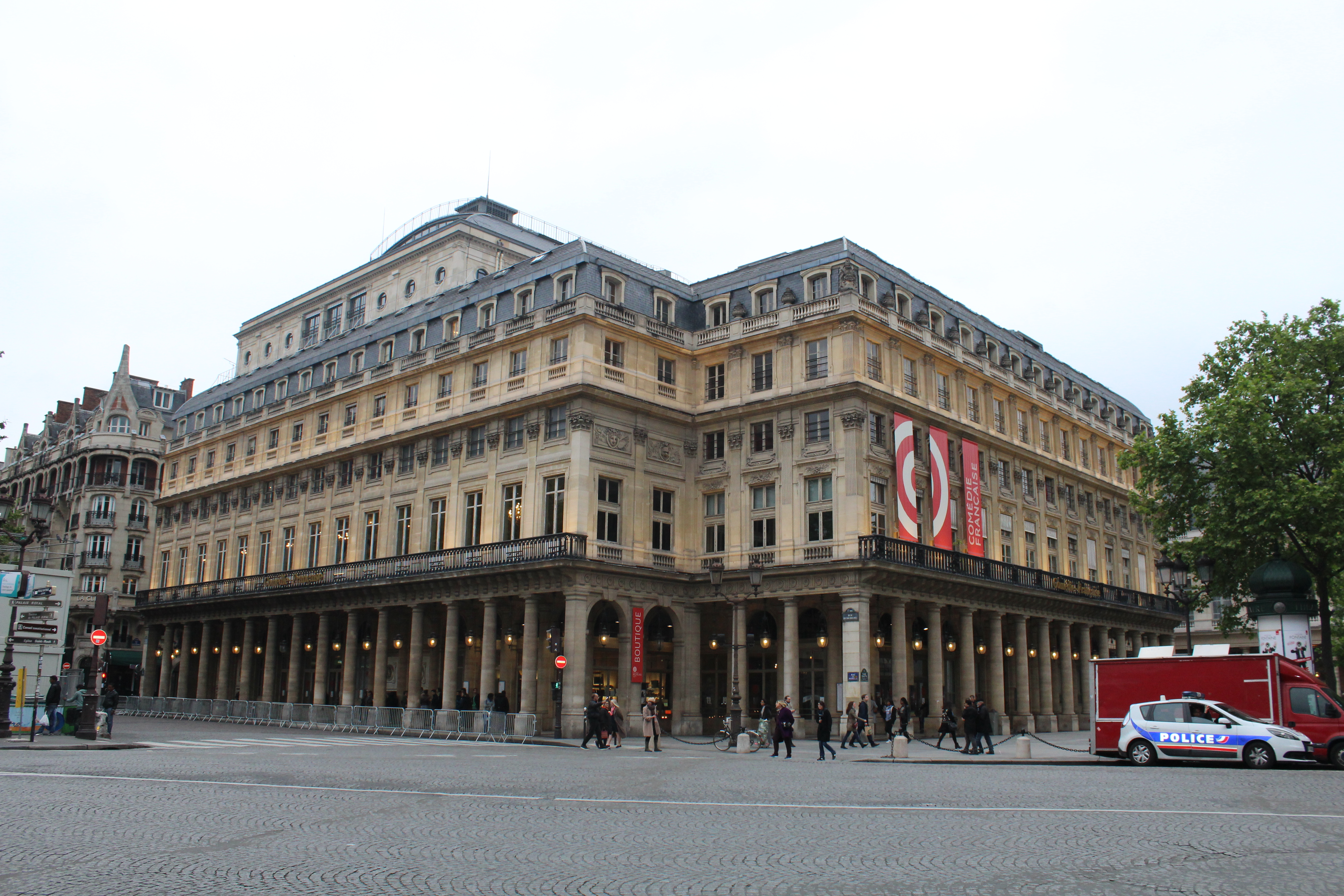 Comédie-Française, Paris.